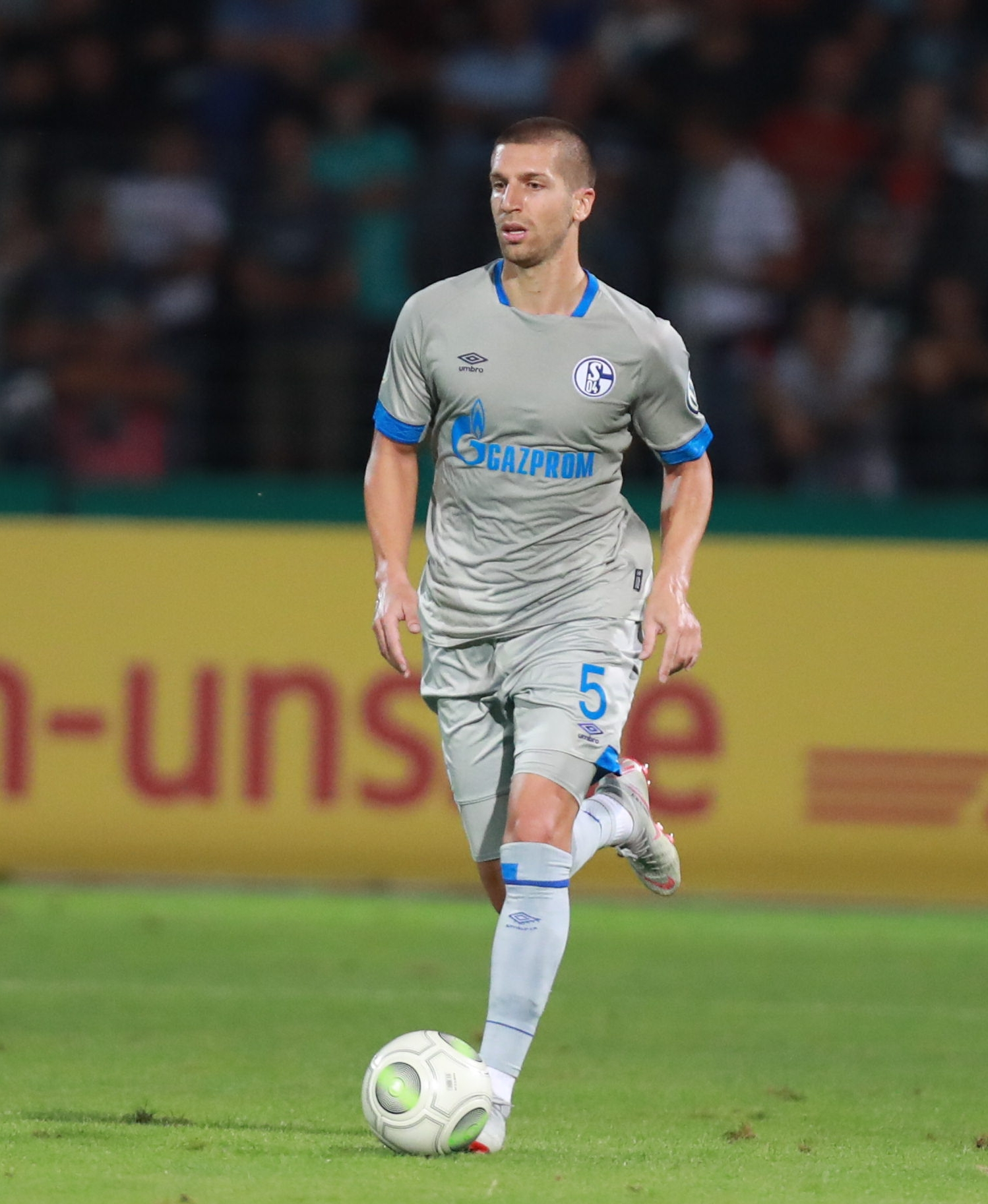 DFB-Pokal 2018/19, 1. Hauptrunde: 1. FC Schweinfurt 05 gegen FC Schalke 04 0:2 (0:1)